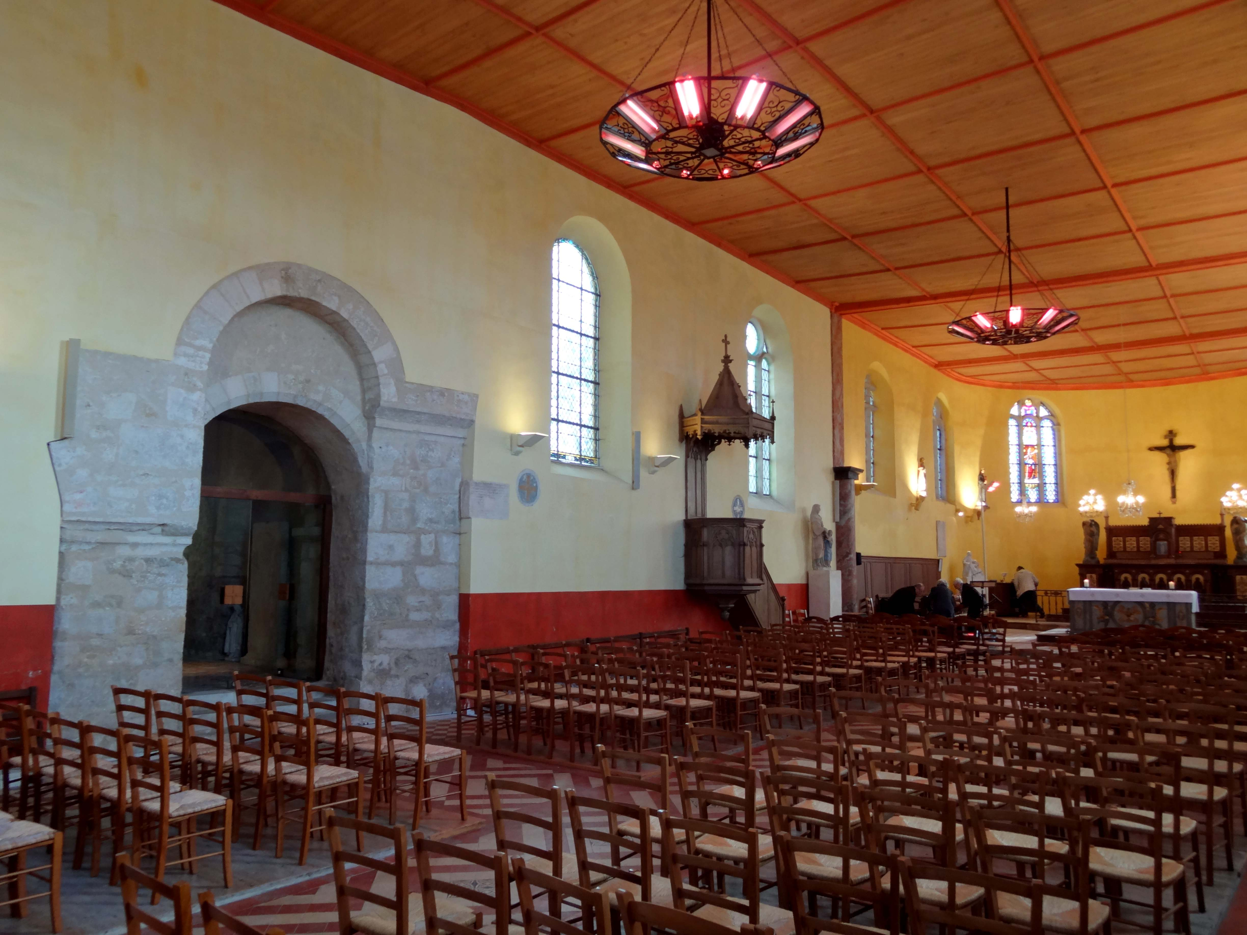 Intérieur de l'église - voir titre.